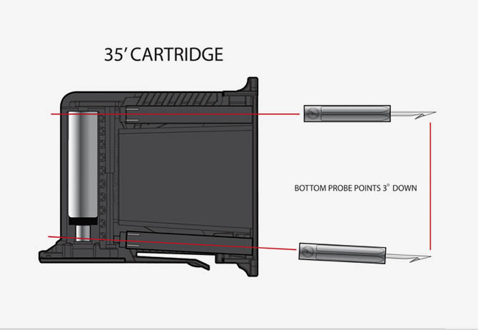 Vsebina nabojnika električnega paralizatorja